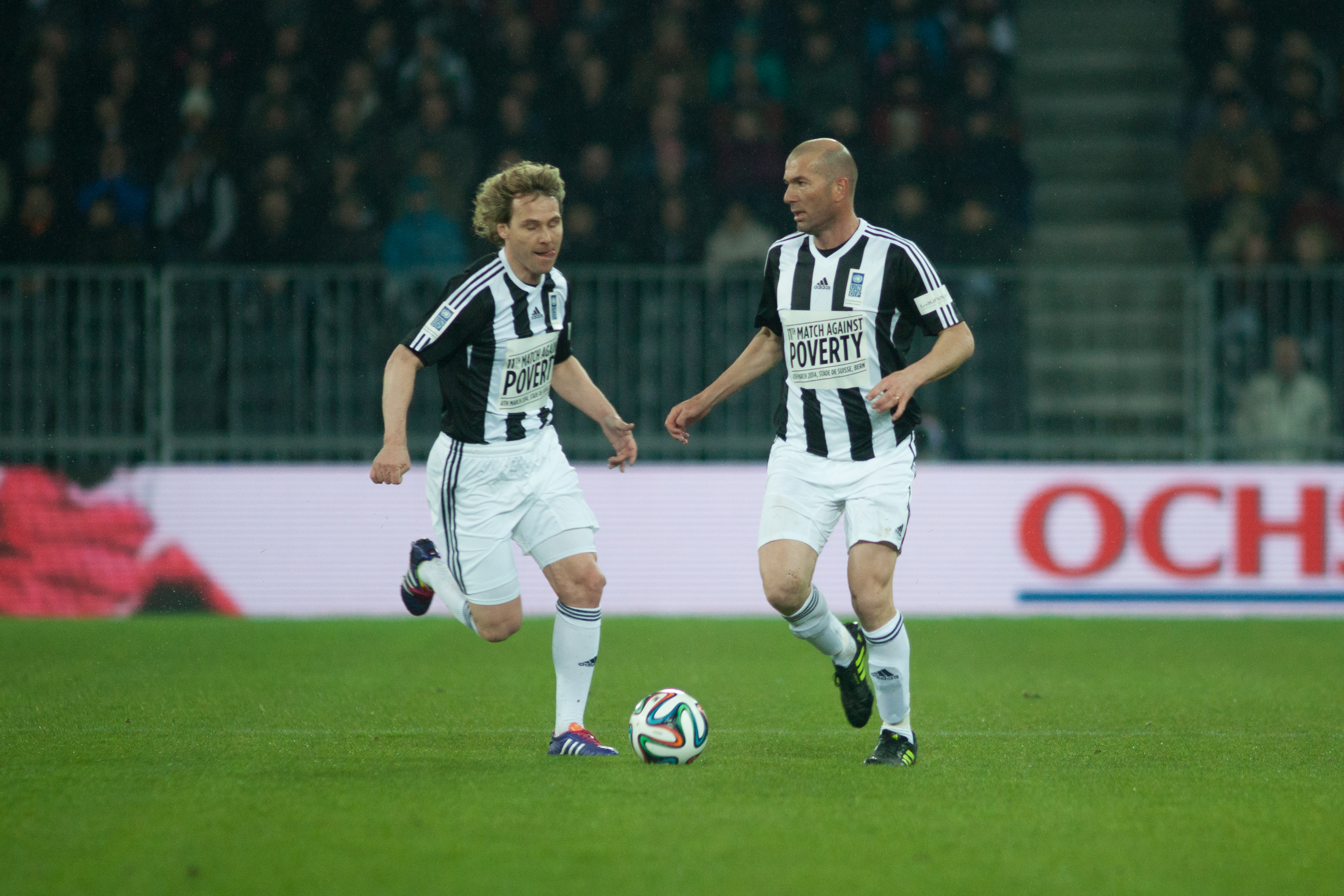 Football against poverty 2014 - Zidane et Nedved